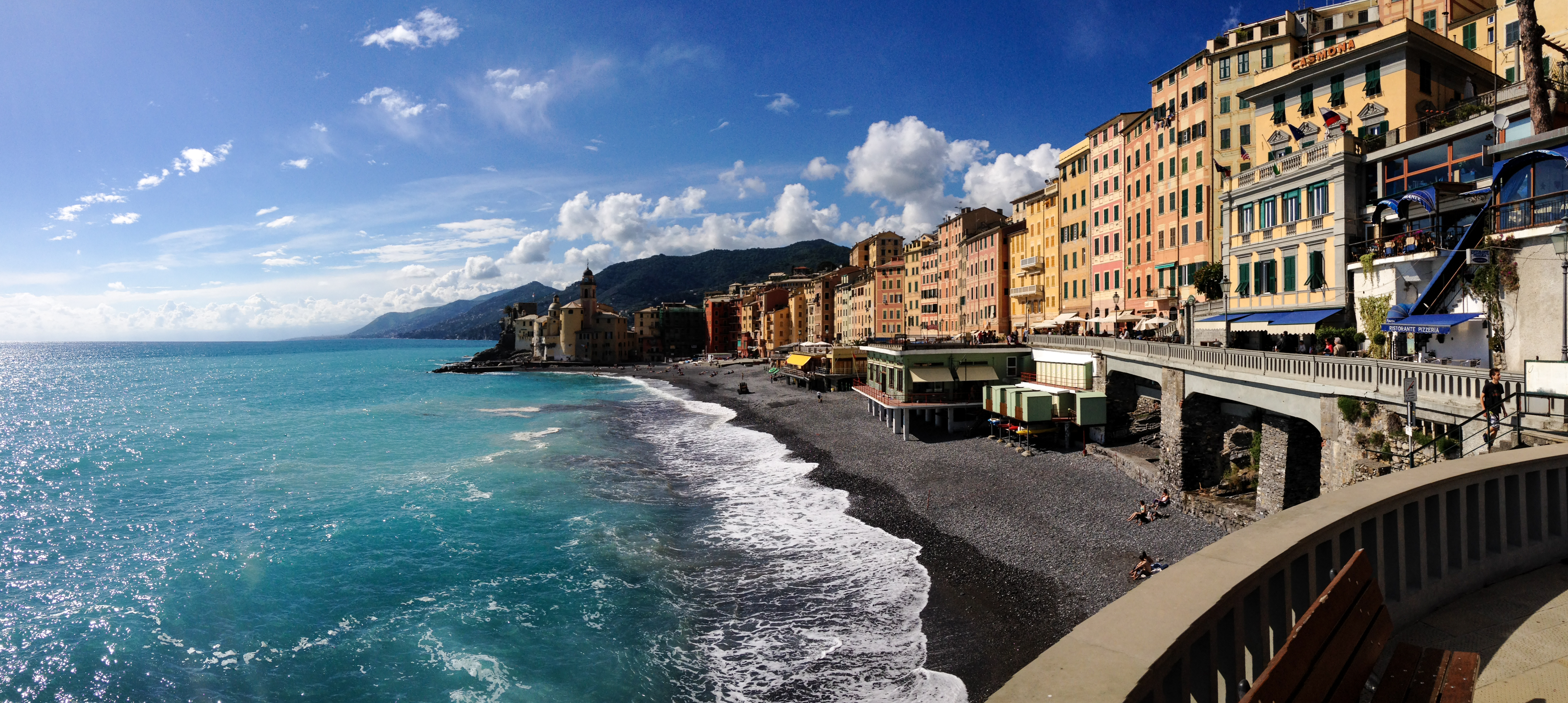 Camogli, Liguria